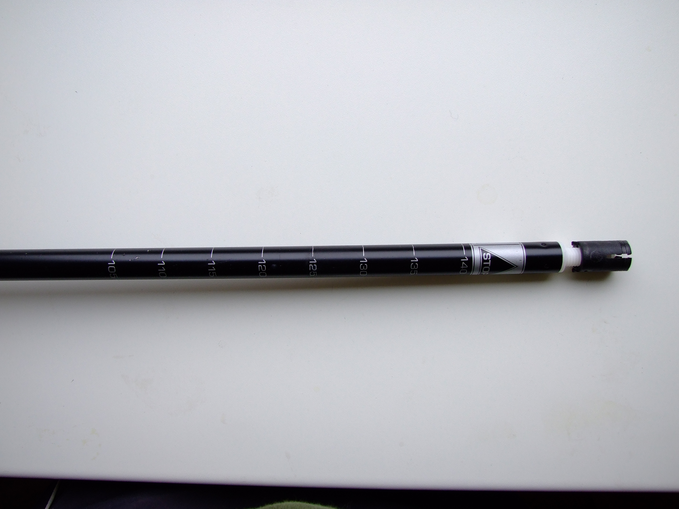 Längenskala eines Trekkingstocks